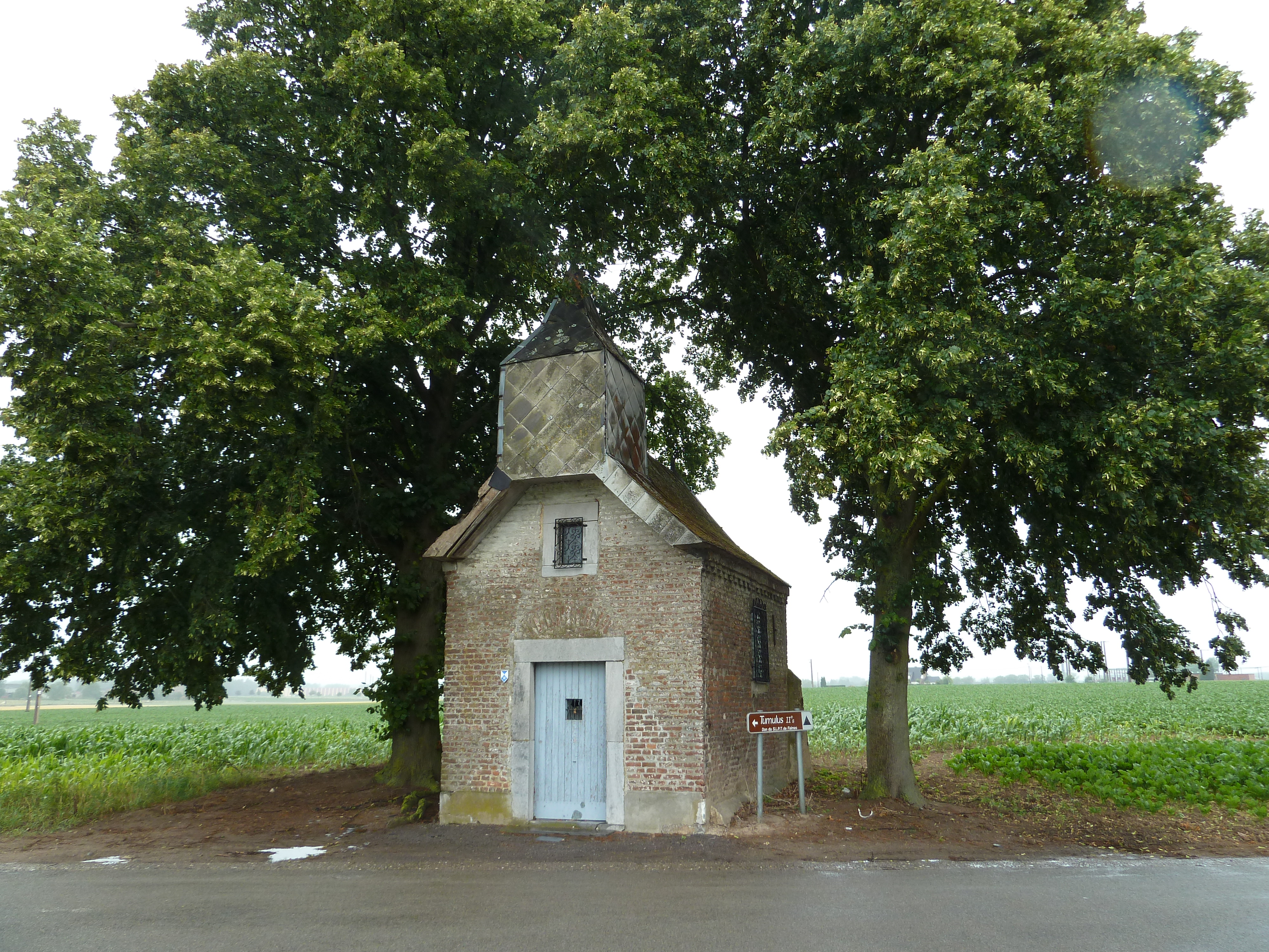 Chapelle Saint-Blaise, Saives, Faimes, Belgique